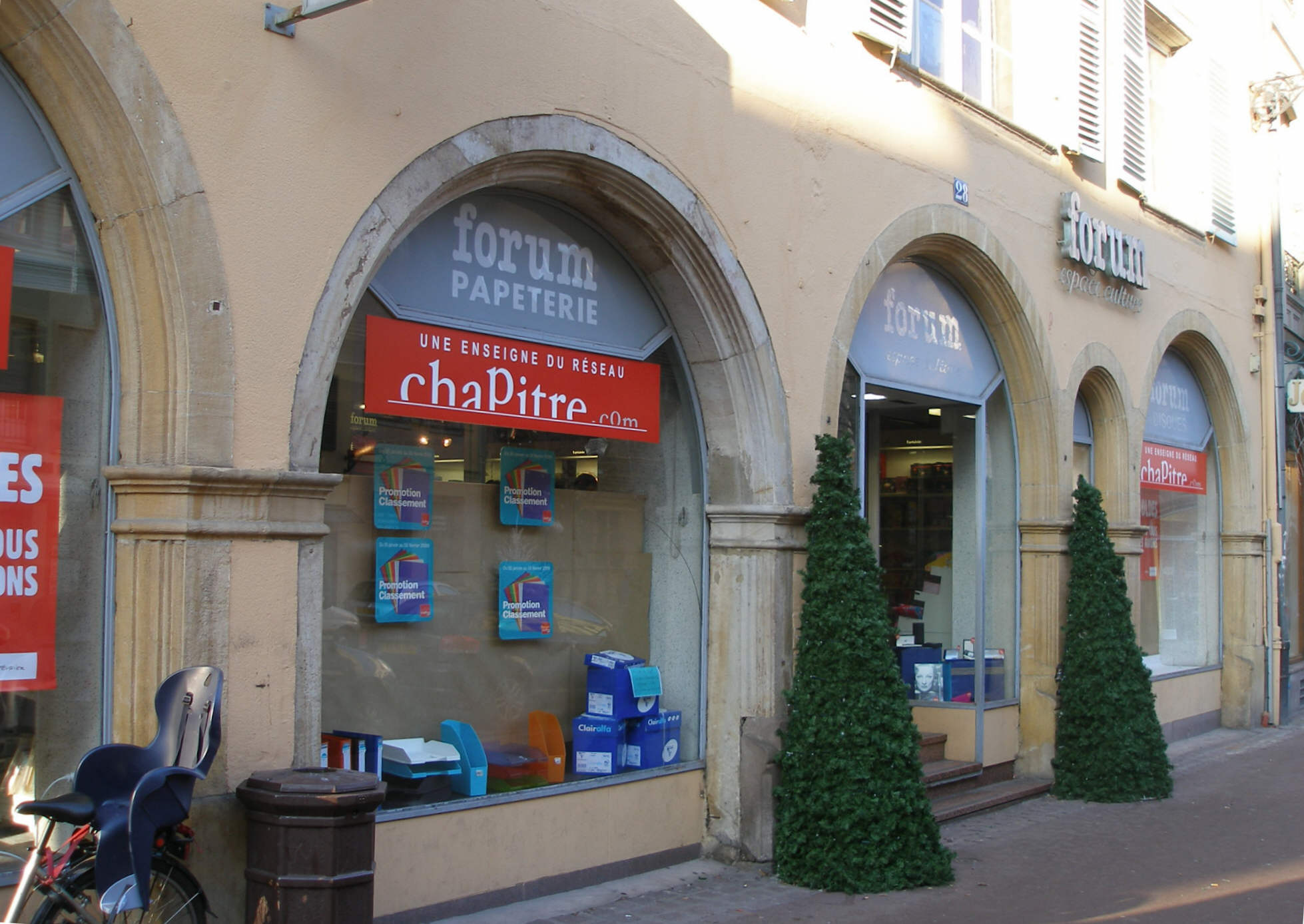 S Hüüs z Colmer in dr Kopf-Stroß, wu friähjer s Gschäft vum Alsatia-Verlag drin gsii isch